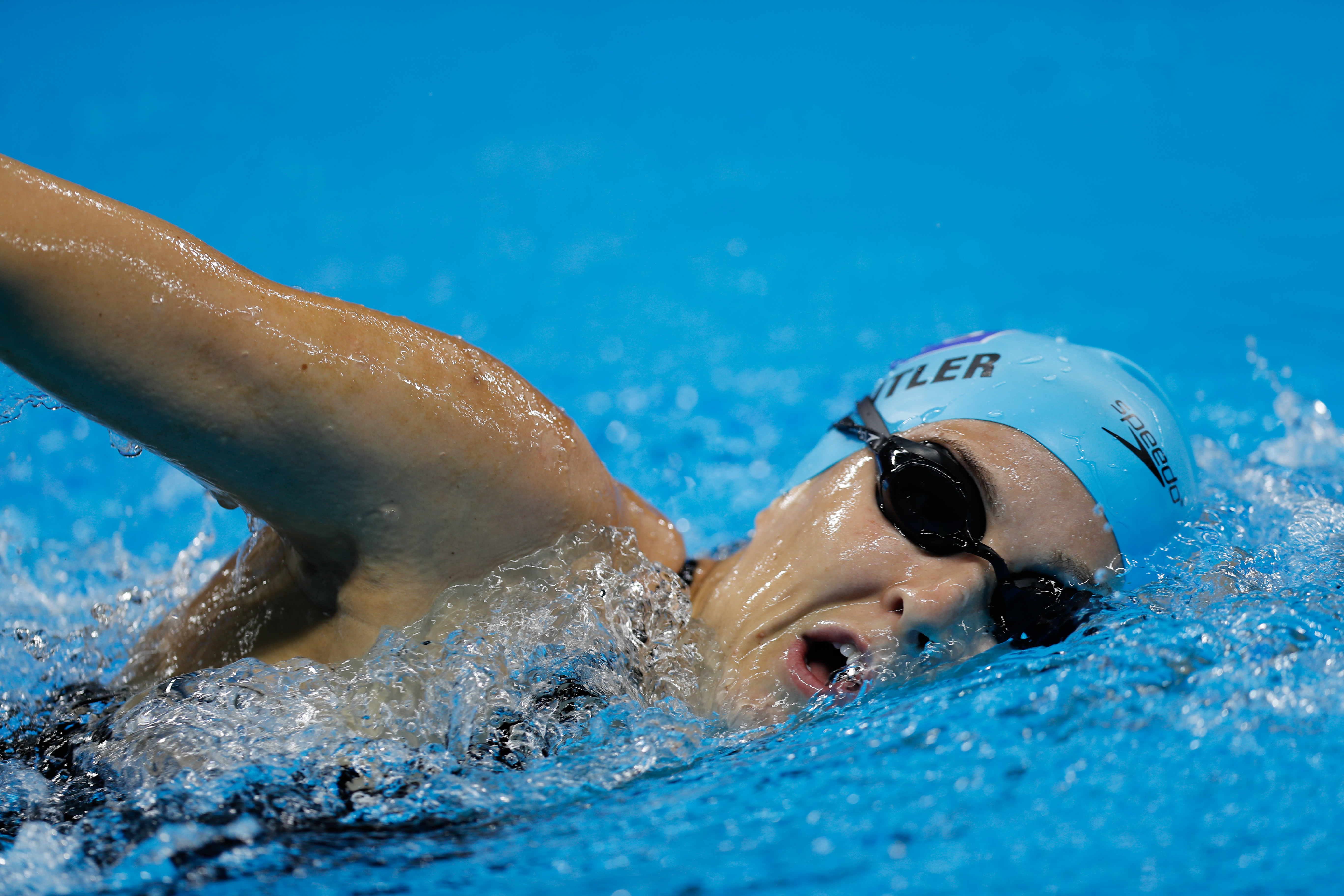 Rio de Janeiro - Atletas da equipe de natação das Ilhas Cayman treinam na piscina do Estádio Aquático, no Parque Olímpico da Barra da Tijuca (Fernando Frazão/Agência Brasil)